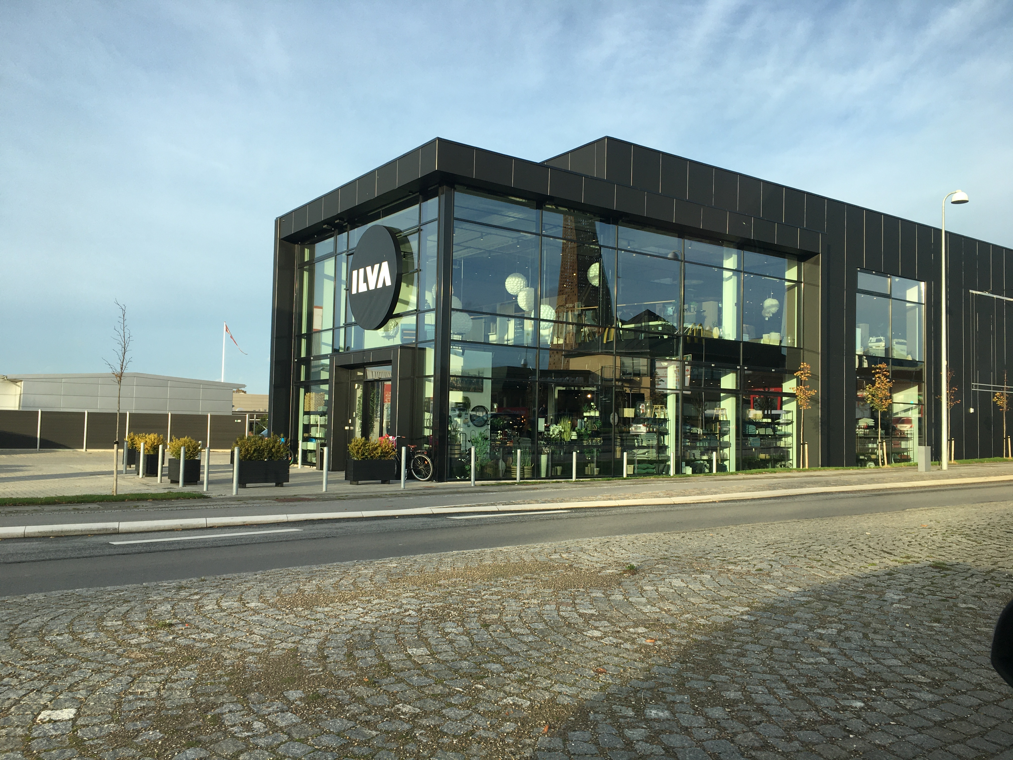 Ilva på Københavnsvej i Roskilde.